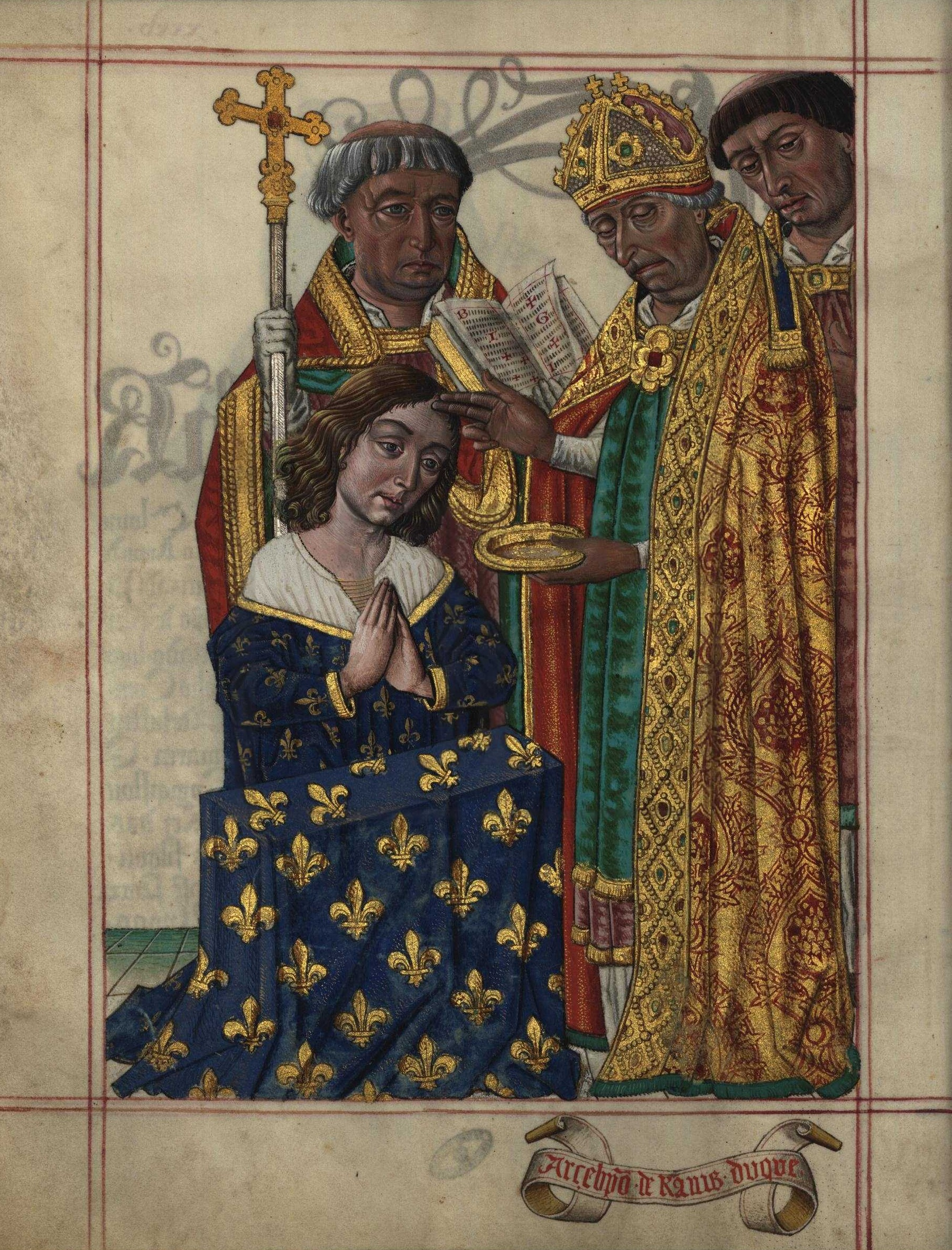 Livro do Armeiro-Mor, Arcebispo de Reims, sagração do Rei da França (fl. 35v)